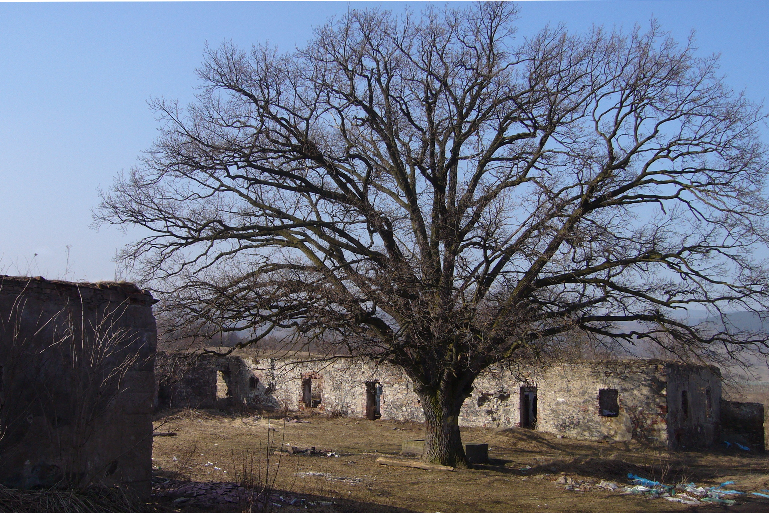 Šumná - hospodářský dvůr